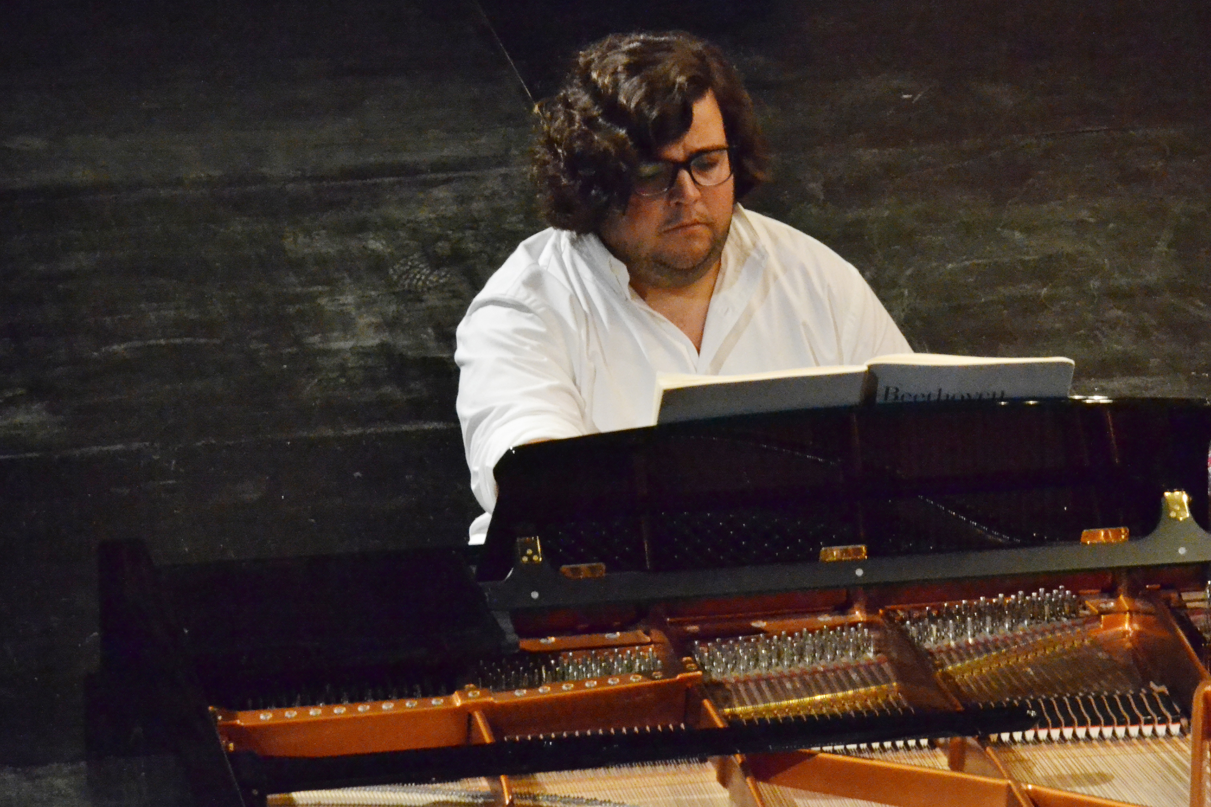 Ambrosio Valero en concierto